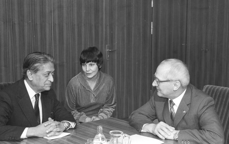 ADN-ZB/Mittelstädt/21/1/81/Berlin: Der Generalsekretär des ZK der SED und Vorsitzender des Staatsrates der DDR, Erich Honecker, empfing Romesh Chandra, Präsident des Weltfriedensrates.